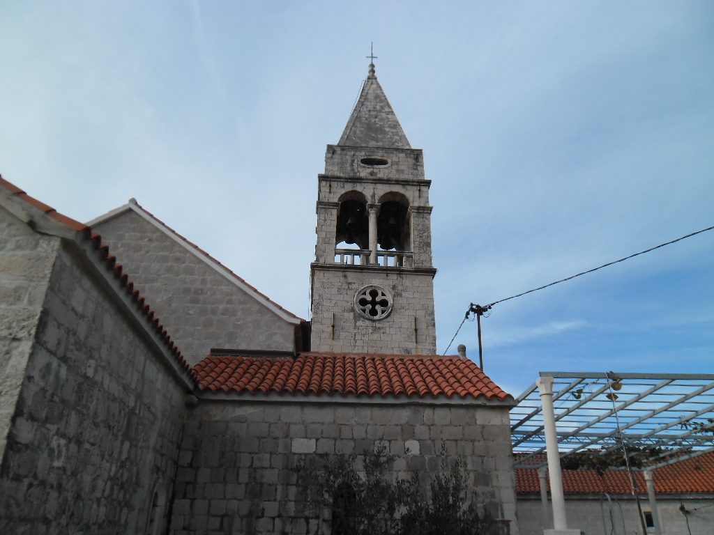 crkva u Šipanskoj Luci